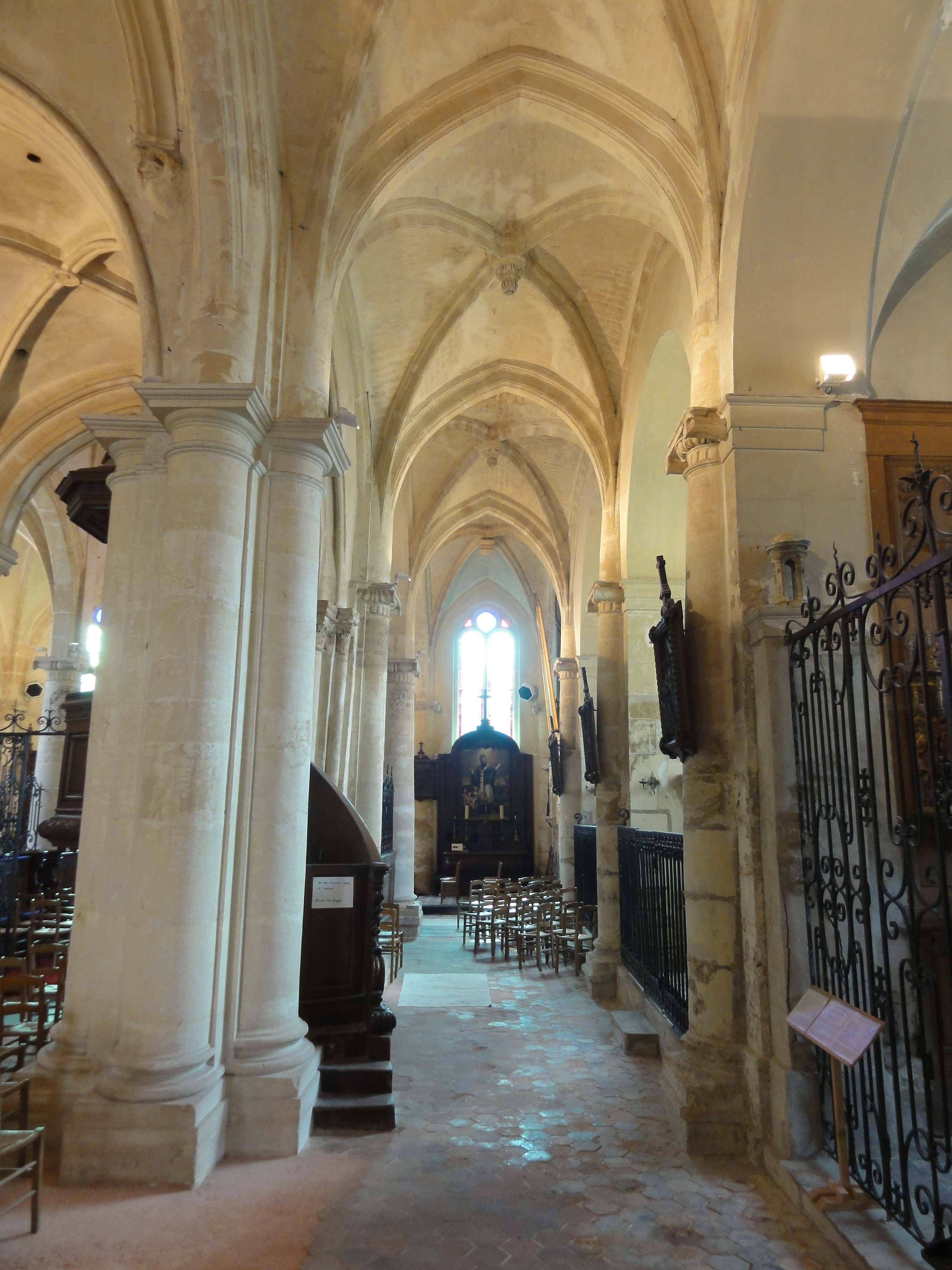 Bas-côté sud, vue vers l'est.